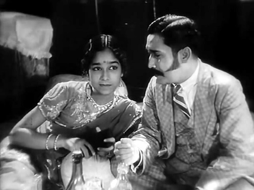 Rajkumari et A.H. Shore dans Devdas (version hindi) (1935)